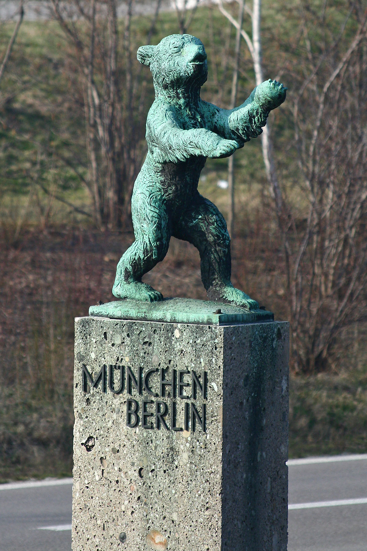 Berliner Bär auf dem Mittelstreifen der Autobahn A9 in München.